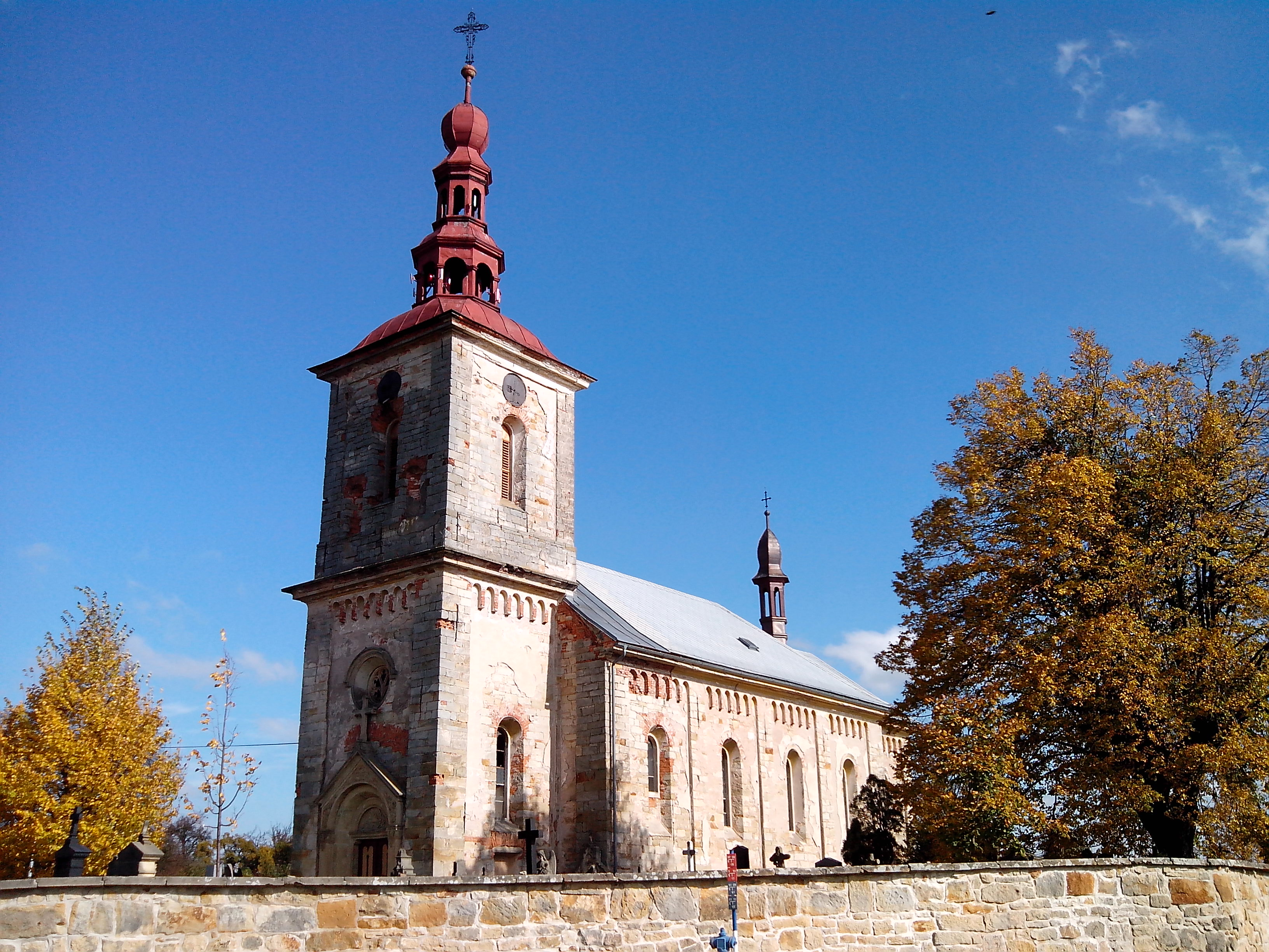 Litíč - kostel Nejsvětější Trojice